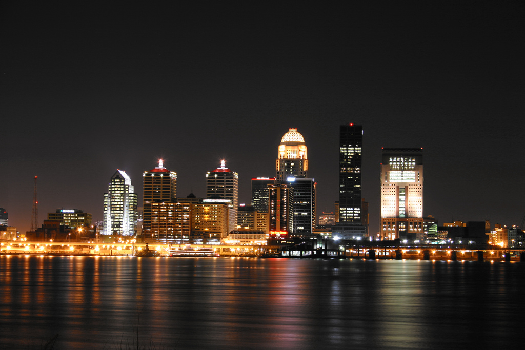 Louisville skyline night Kentucky - Panorama de Louisville